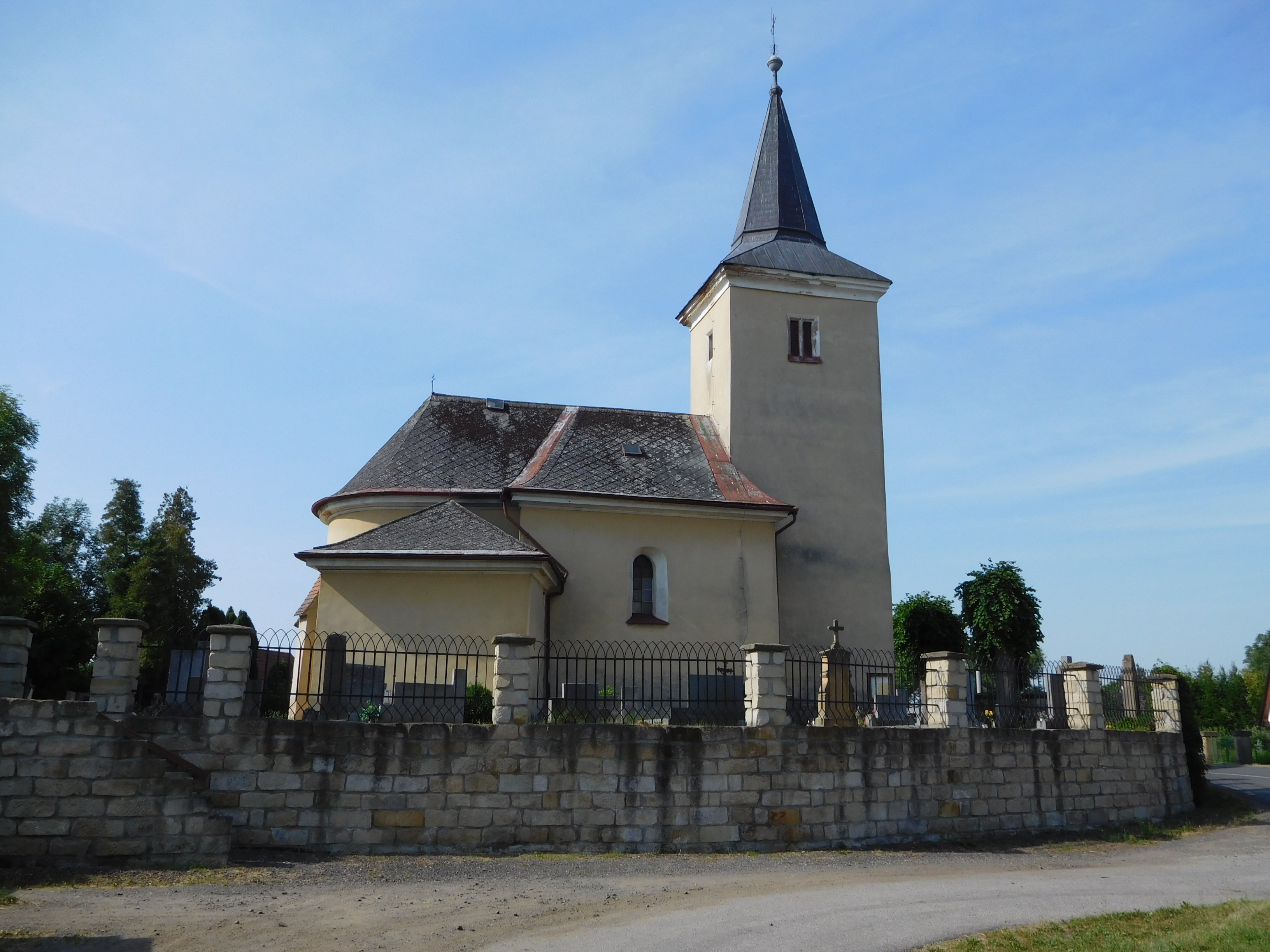 Zliv - Kostel Nalezení svatého Kříže